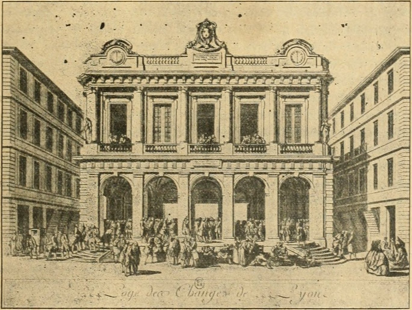 Estampe d'une maison de change à Lyon dans l'Histoire socialiste de la France contemporaine (tome I).